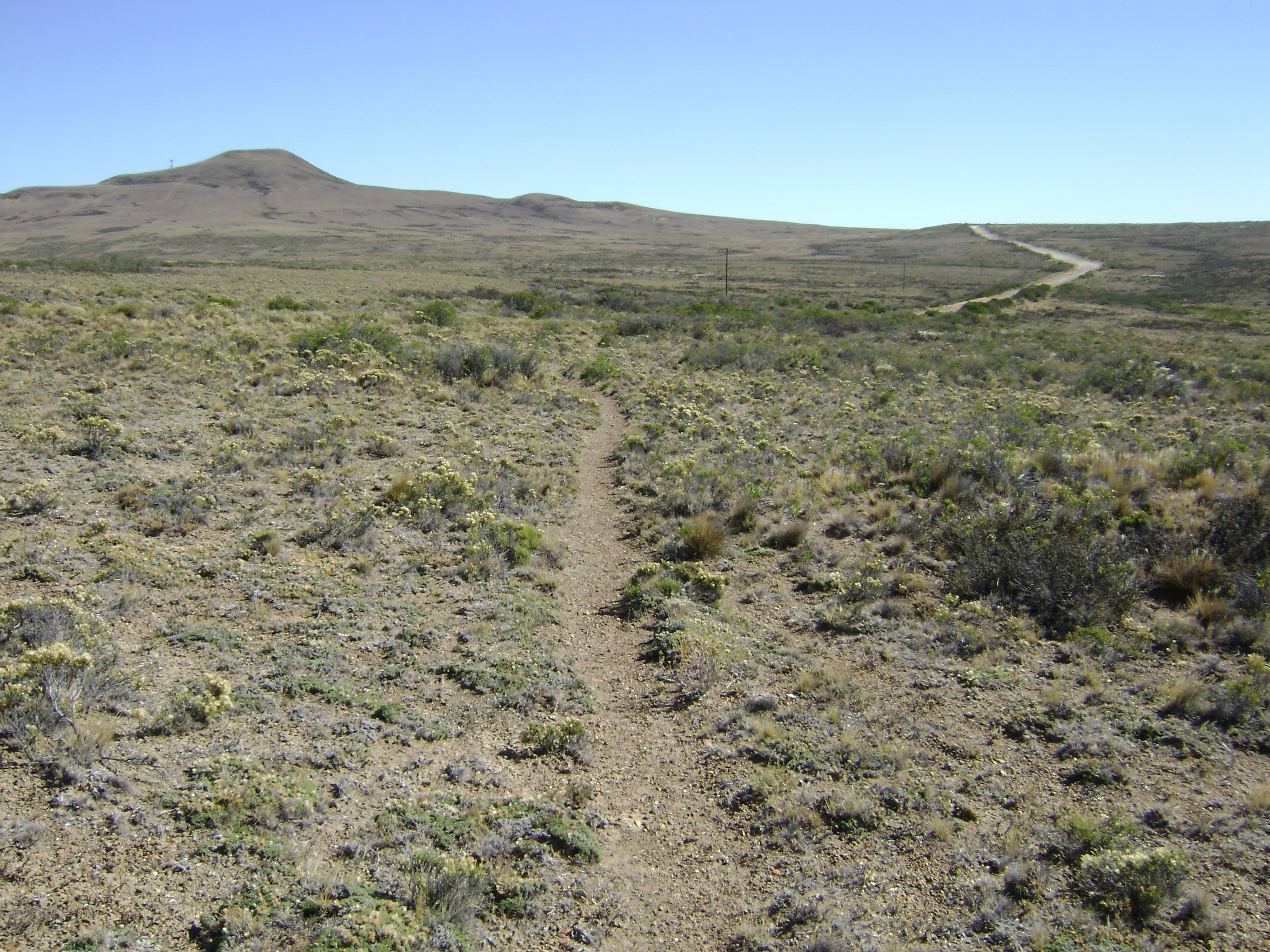 Cerro de Monte Cristo. En este cerro es donde Magallanes manda a instalar una gran cruz antes de su partida el 21.08.1520. Antonio Pigafetta, cronista (nao Trinidad), escribió en su Relación del primer viaje alrededor del mundo: "Toma de posesión.- Plantamos una cruz en la cima de una montaña cercana, a la que llamamos Monte-Cristo, y tomamos posesión de esta tierra en nombre del rey de España." José de Arteche escribe en su libro El Cano: "Costeando siempre, al llegar a los 49° 30' de latitud meridional las naos hallaron un excelente abrigo, un buen puerto natural, que al punto fue denominado por todos el puerto de San Julián, en recuerdo del día de su descubrimiento. Aquellos hombres estaban muy compenetrados con el año cristiano. Magallanes considerando que aquella rada era muy cómoda ordenó detenerse. Las naos allí pasarían el terrible invierno austral. Inmediatamente después del desembarco, unos hombres marcharon a la cima del monte que domina el puerto y clavaron allí una gran Cruz. Con este acto sencillo y grandioso tomaron posesión de aquellas tierras". La expedición de Magallanes-Elcano estuvo en esta región patagónica desde el 31.03.1520 hasta su partida, el 21.08.1520. Posteriormente, en 1670, la expedición del contralmirante británico John Narborough exploró las costas patagónicas y John Wood, uno de sus hombres, acompañado de otros marinos, inspeccionó la bahía de San Julián, ascendió al "Monte de Cristo" y practicó en la tosca del lugar la inscripción "John Wood". En 1746 la expedición de Joaquín Olivares y Centeno descubrió la inscripción y desde entonces el monte es conocido como Monte Wood. Puerto de San Julián. Santa Cruz. Argentina. Vídeo: Expedición Elcano - Magallanes